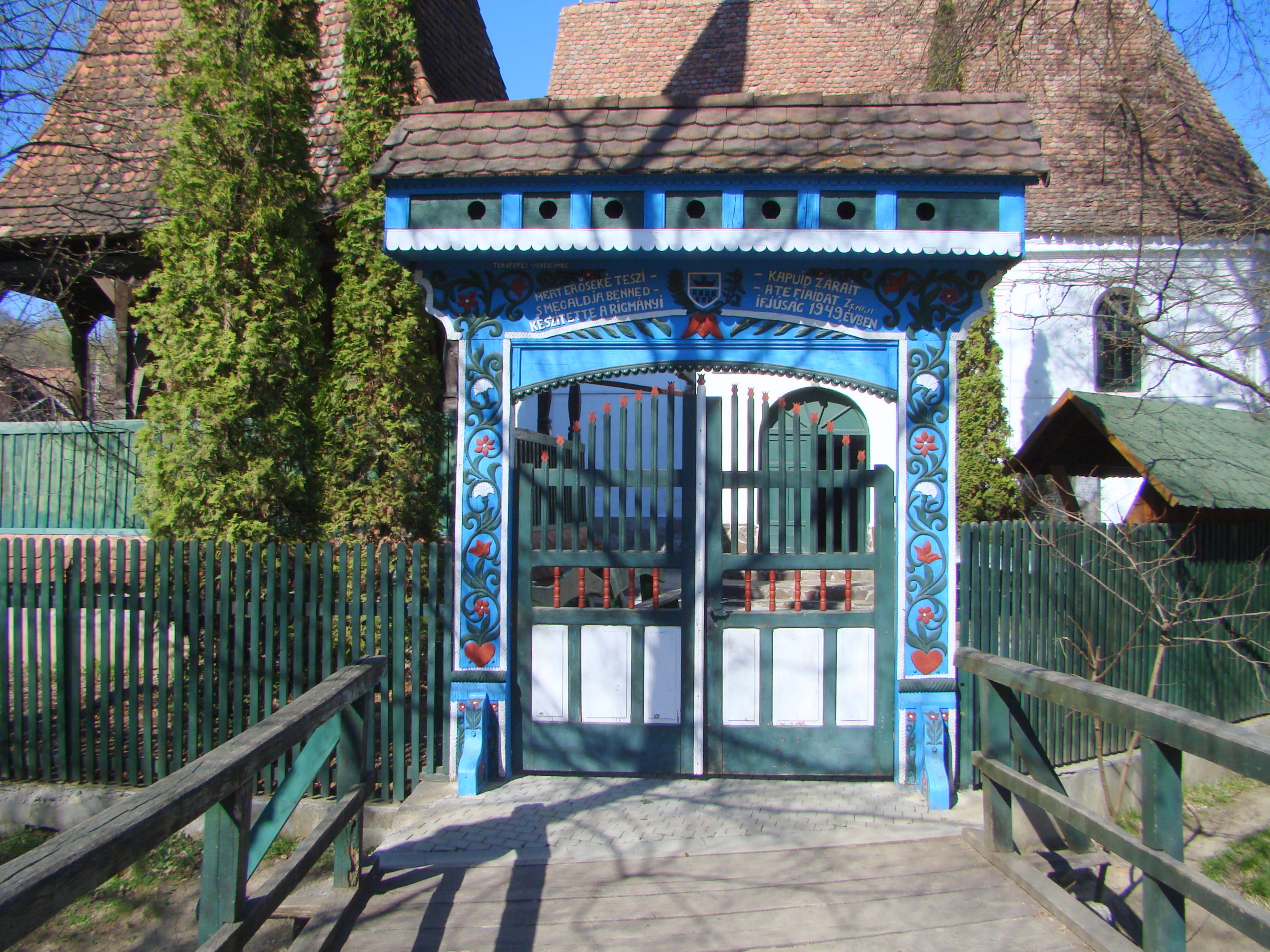 Ansamblul bisericii reformate, sat Rigmani; comuna Neaua